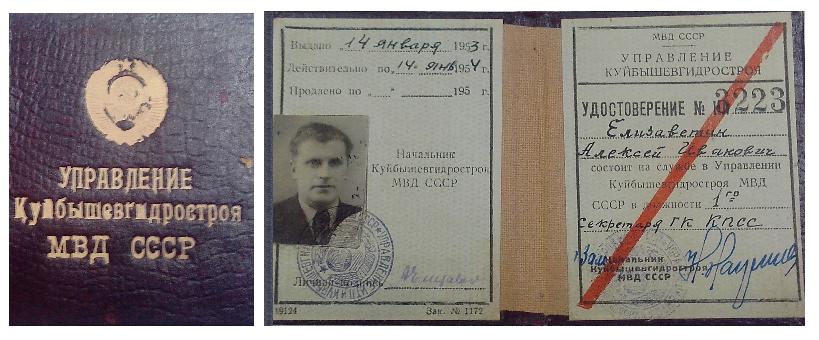 Удостоверение управления "Куйбышевгидростроя" (КГС) при МВД СССР, при строительстве "Волжской ГЭС" и города Тольятти.